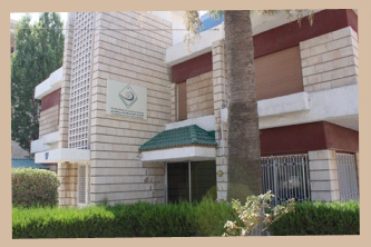 مبنى أكاديمية العالم الاسلامي للعلوم